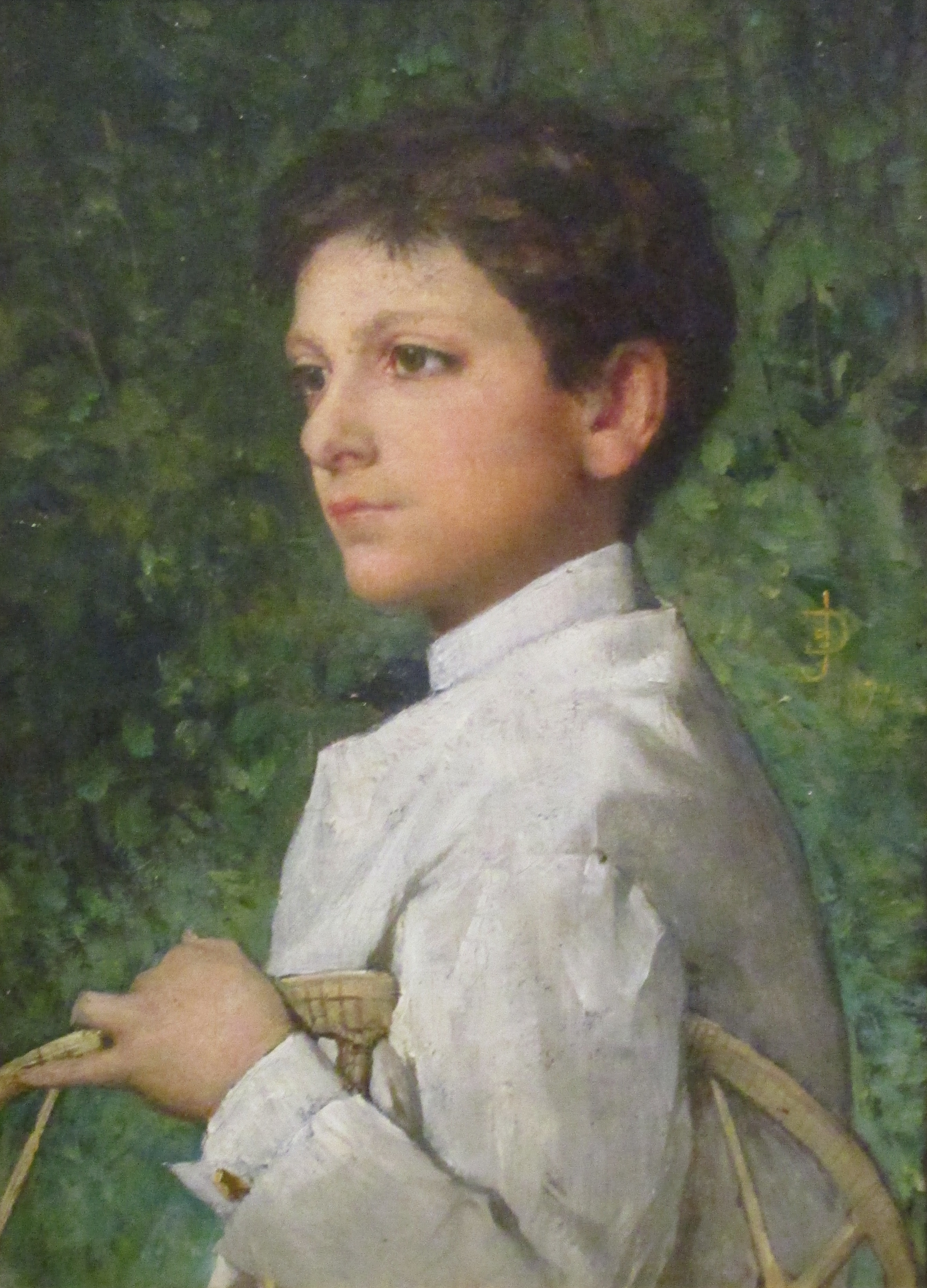 Portrait de Georges Desvallières (1861-1950) enfant par Jules-Élie Delaunay. Collection particulière. Exposé en 2016 au Petit Palais.